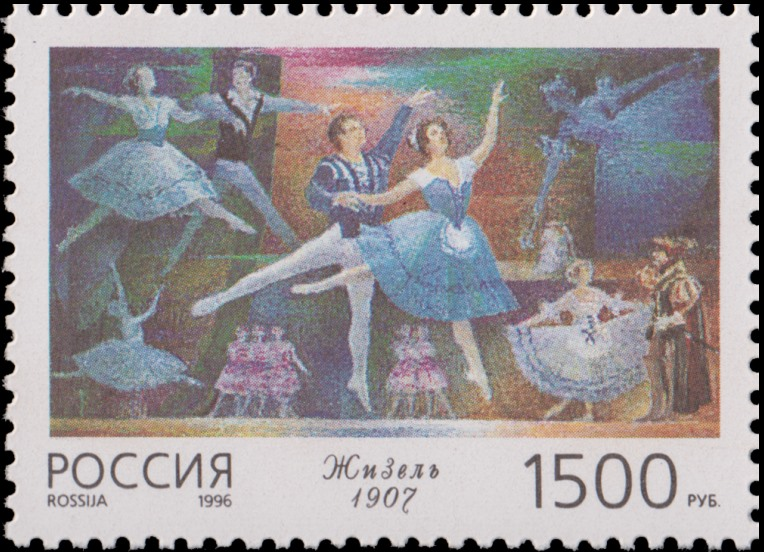 «Жизель».